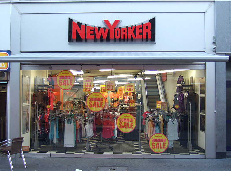 New Yorker Gescäft in Mainz